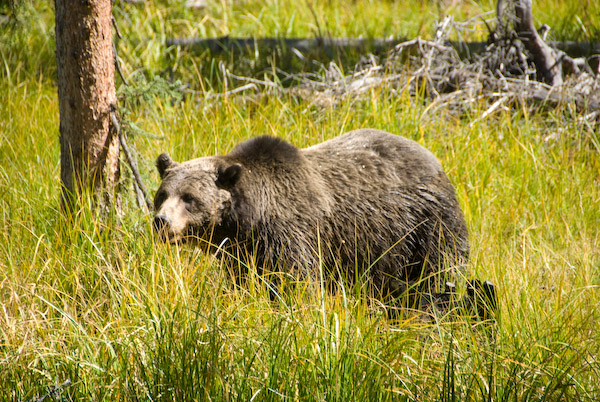 Yellowstone NP